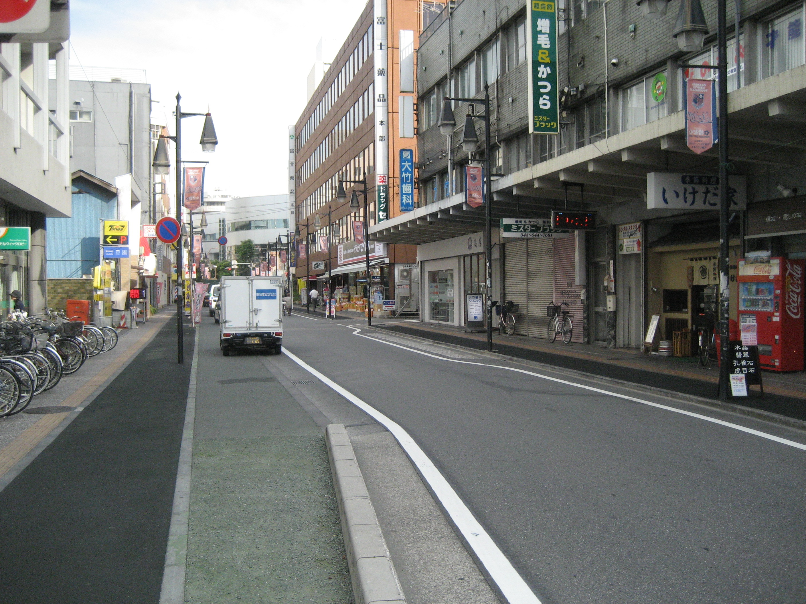 埼玉県道121号線大宮駅西口方面（一方通行区間）